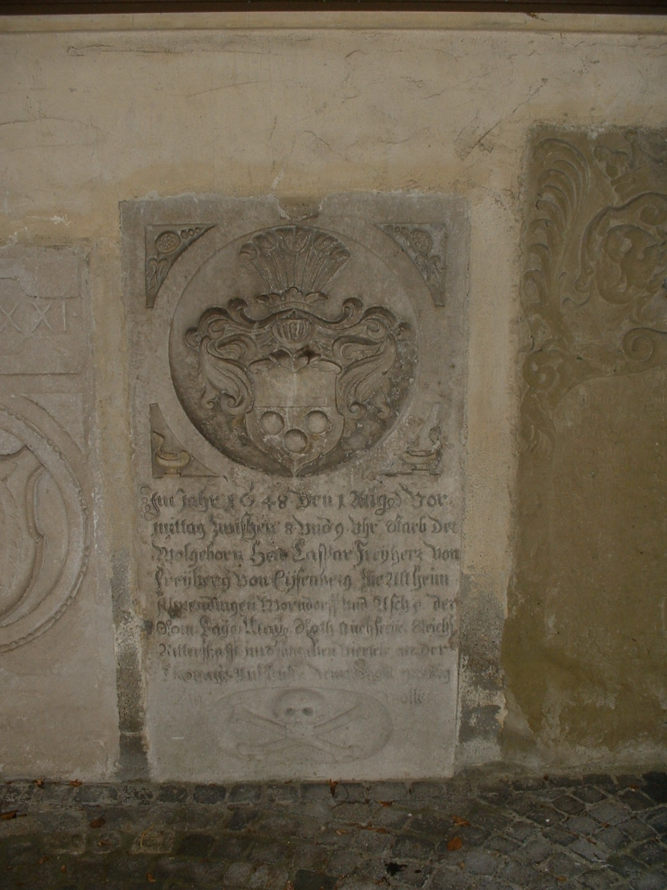 Söflingen Abbey, gravestone